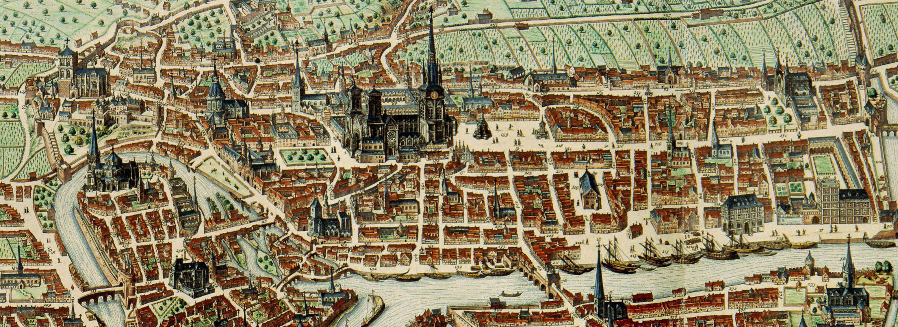 Carte de Blaeu: vues des sept collégiales